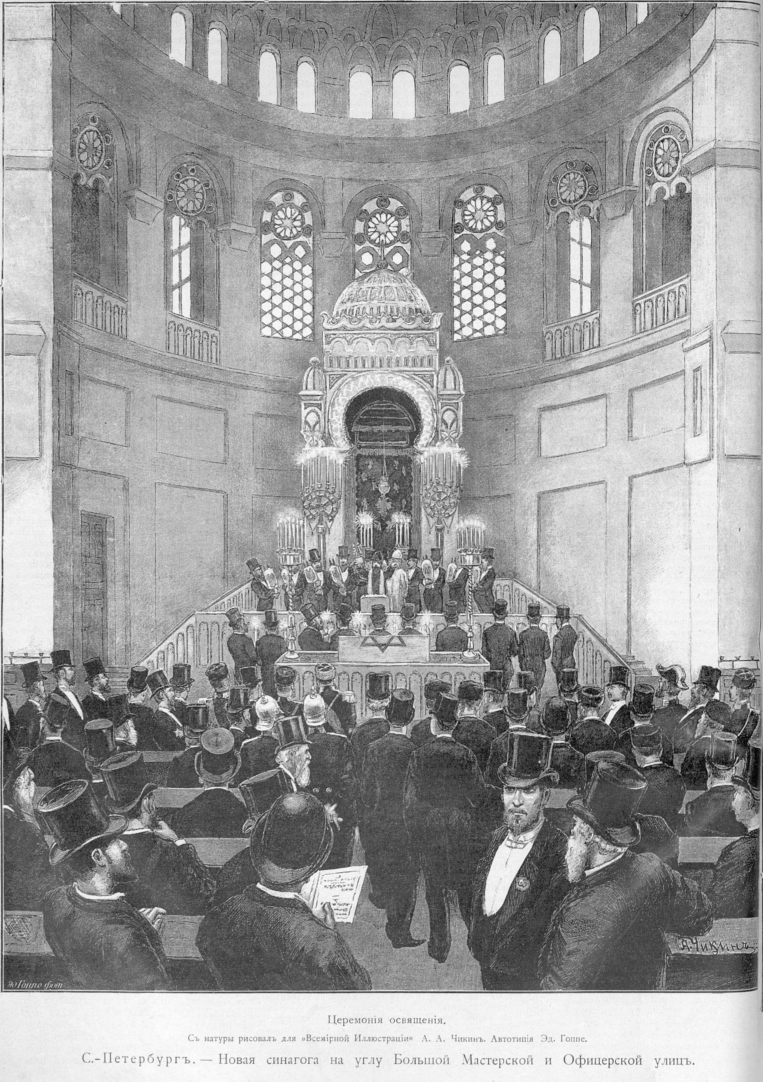 Церемония освящения Большой хоральной синагоги в Петербурге.